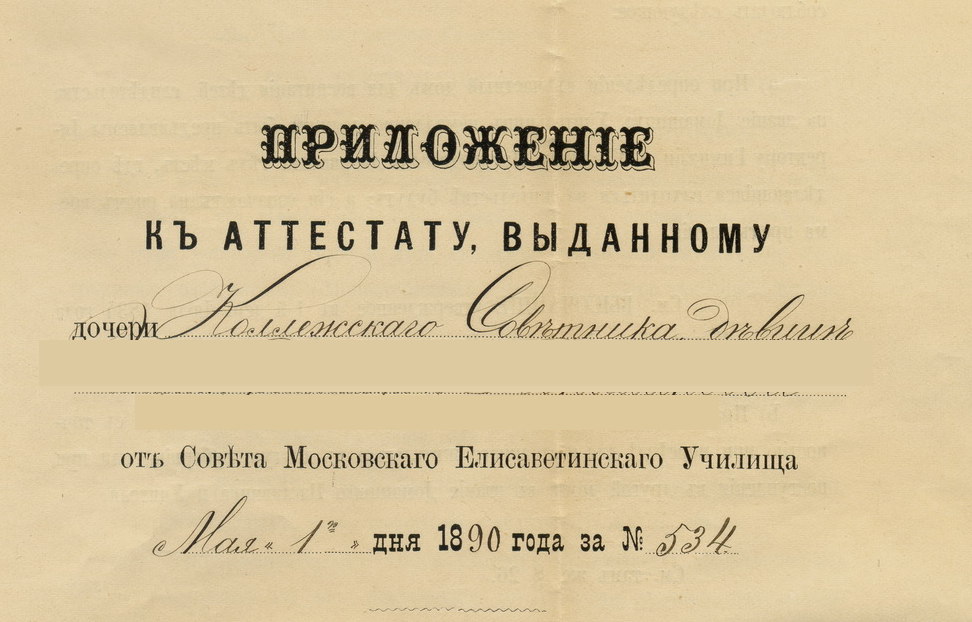 аттестат